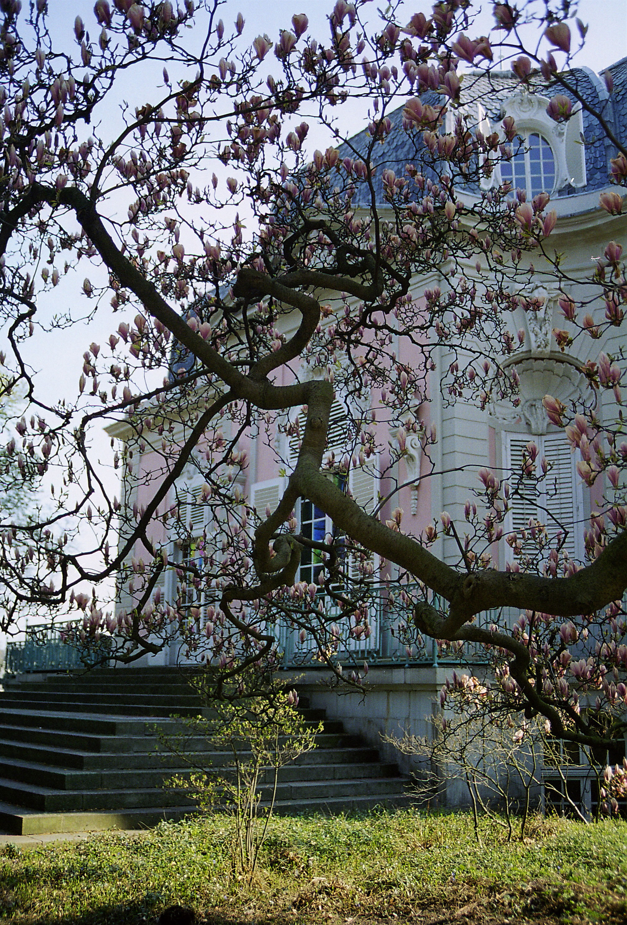 Benrath, Corps de Logis, Westseite, vom Englischen Garten aus gesehen